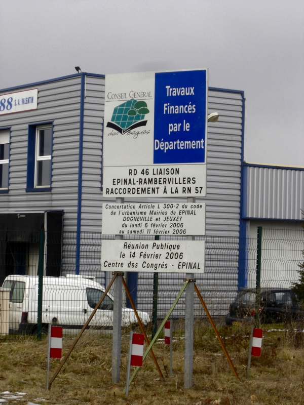 Liaison Epinal-Rambervillers.